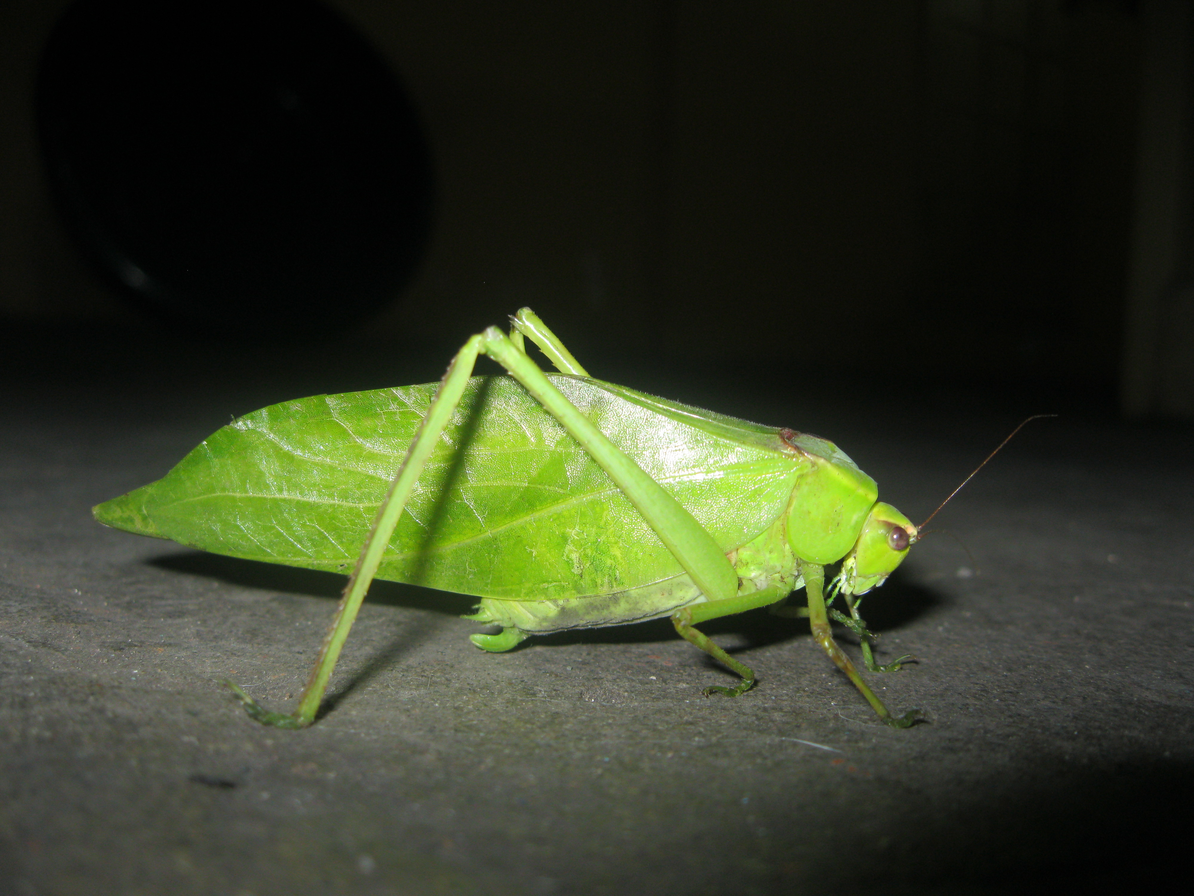 Saltamontes hoja verde captado en el patio de una casa en Guayaquil, Ecuador.